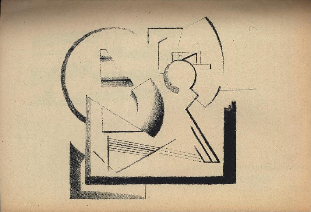 Viking Eggeling. Basse générale de la peinture. Extension. Lithography. From Dada, Nr. 4/5 (15 May 1919): [p. 8].